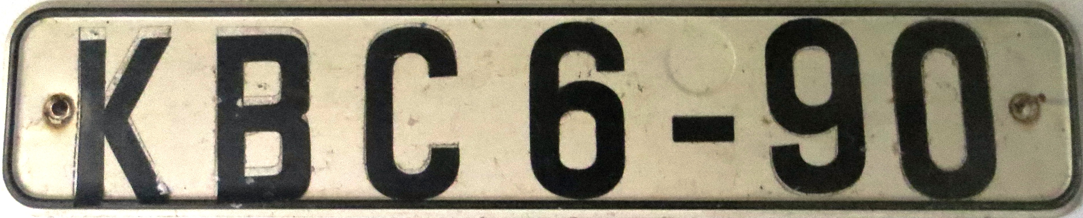 DDR kentekenplaat